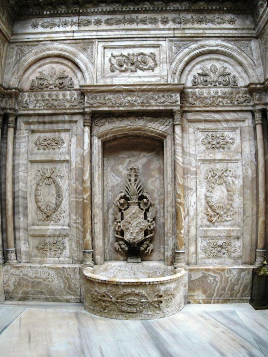 The Sultan's Hamam (Selamlık Hünkâr Hamamı) in Dolmabahçe Palace. (#14 on the tour.)